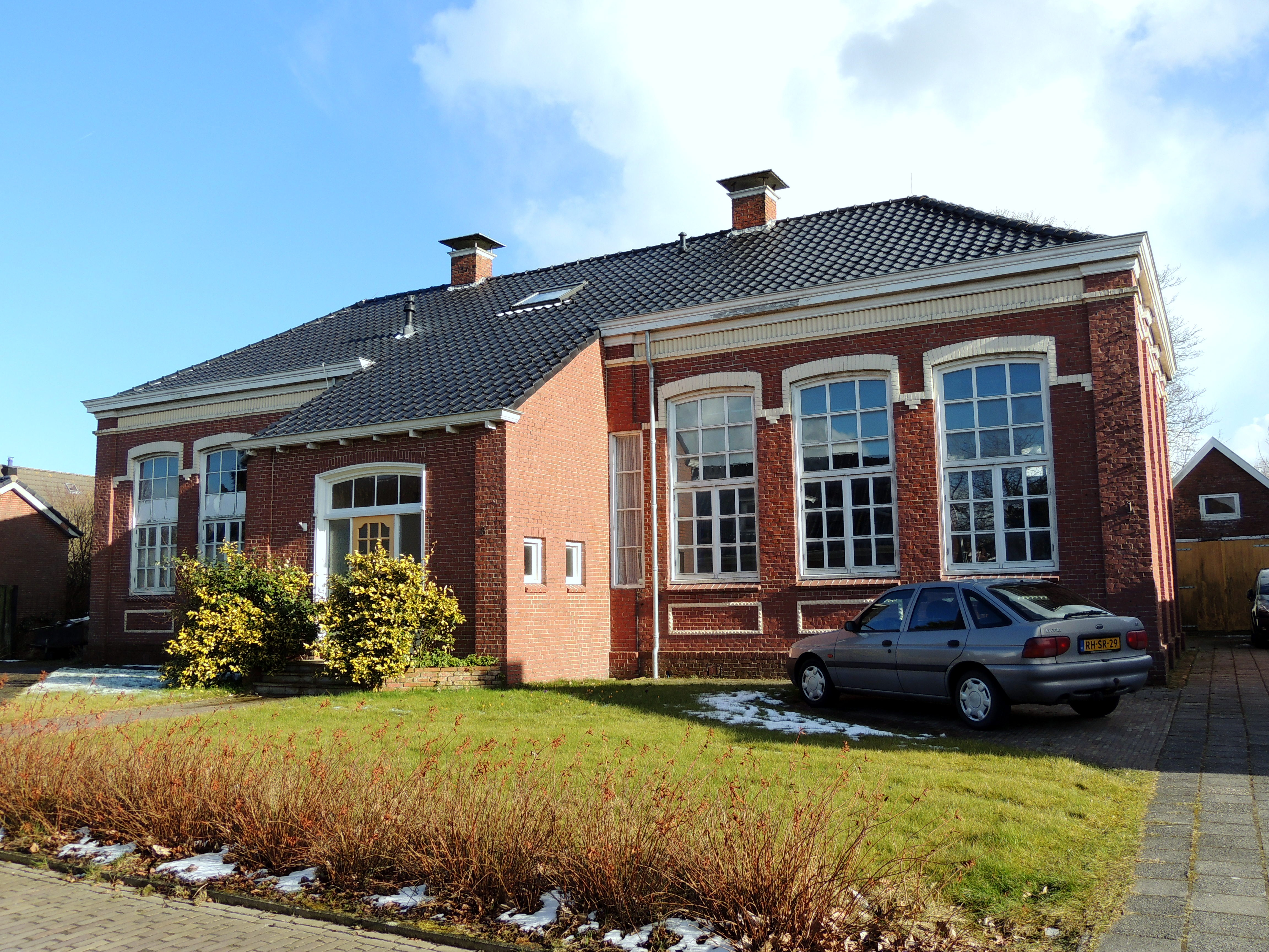 School (te weinig leerlingen) nu gesloten.